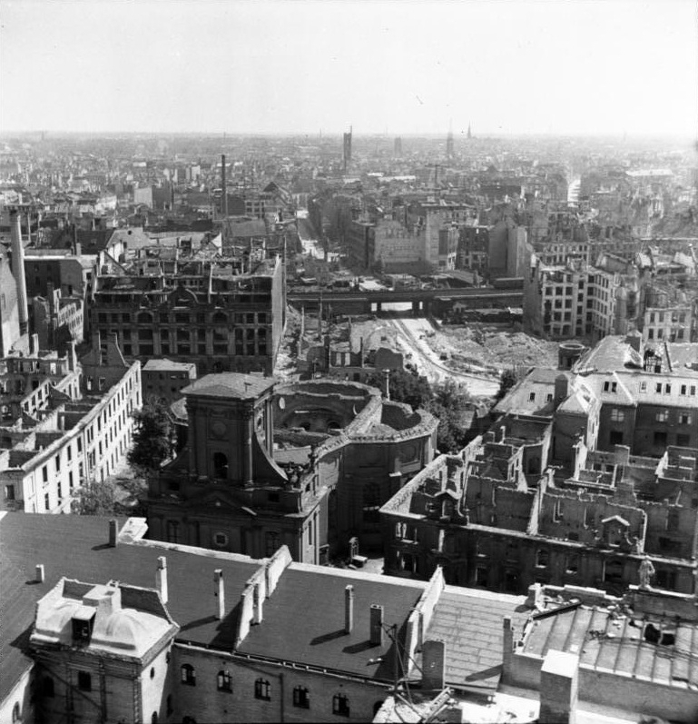 Berlin, Blick auf die zerstörte Stadt ADN-ZB-Heinscher Berlin Blick vom Alten Stadthaus auf die im II. Weltkrieg zerstörte Stadt . Im Vordergrund die Ruine der Parochialkirche. Aufn. Mai 1947 579-47